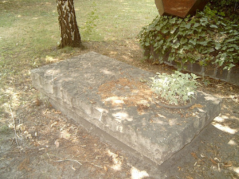 Domanovszky Endre (Budapest, 1907. január 23. – Budapest, 1974. május 15.) kétszeres Kossuth- és Munkácsy-díjas magyar festő sírja Budapesten. Kerepesi temető: 34/2-1-28.